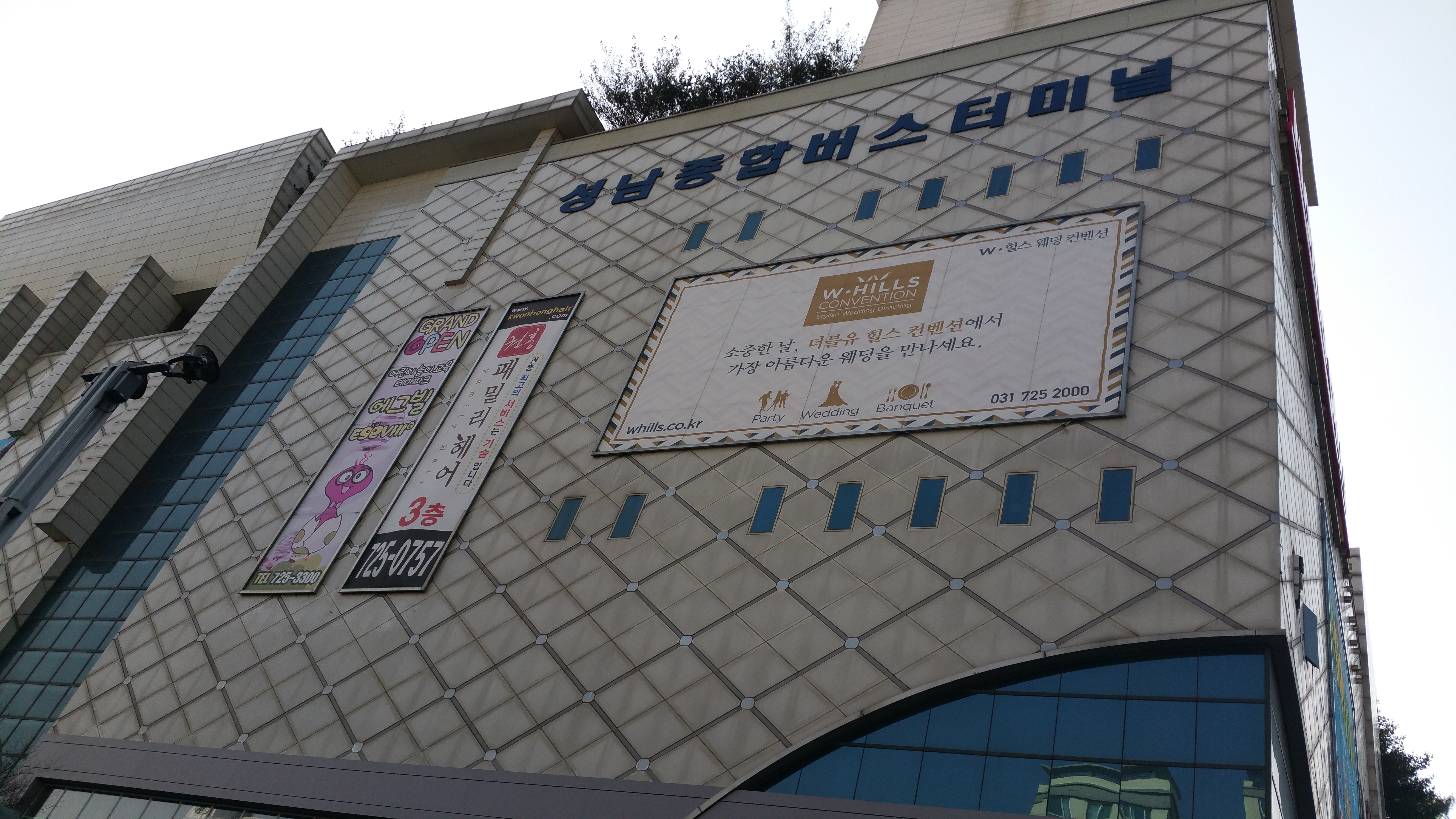 2016년 3월 18일에 촬영한 성남종합버스터미널의 모습